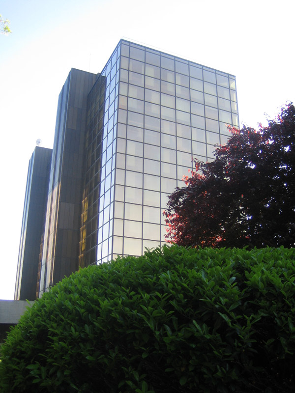 Antonveneta, foto della Sede. Immagine pubblica e di pubblico dominio, scattata nell'estate 2006